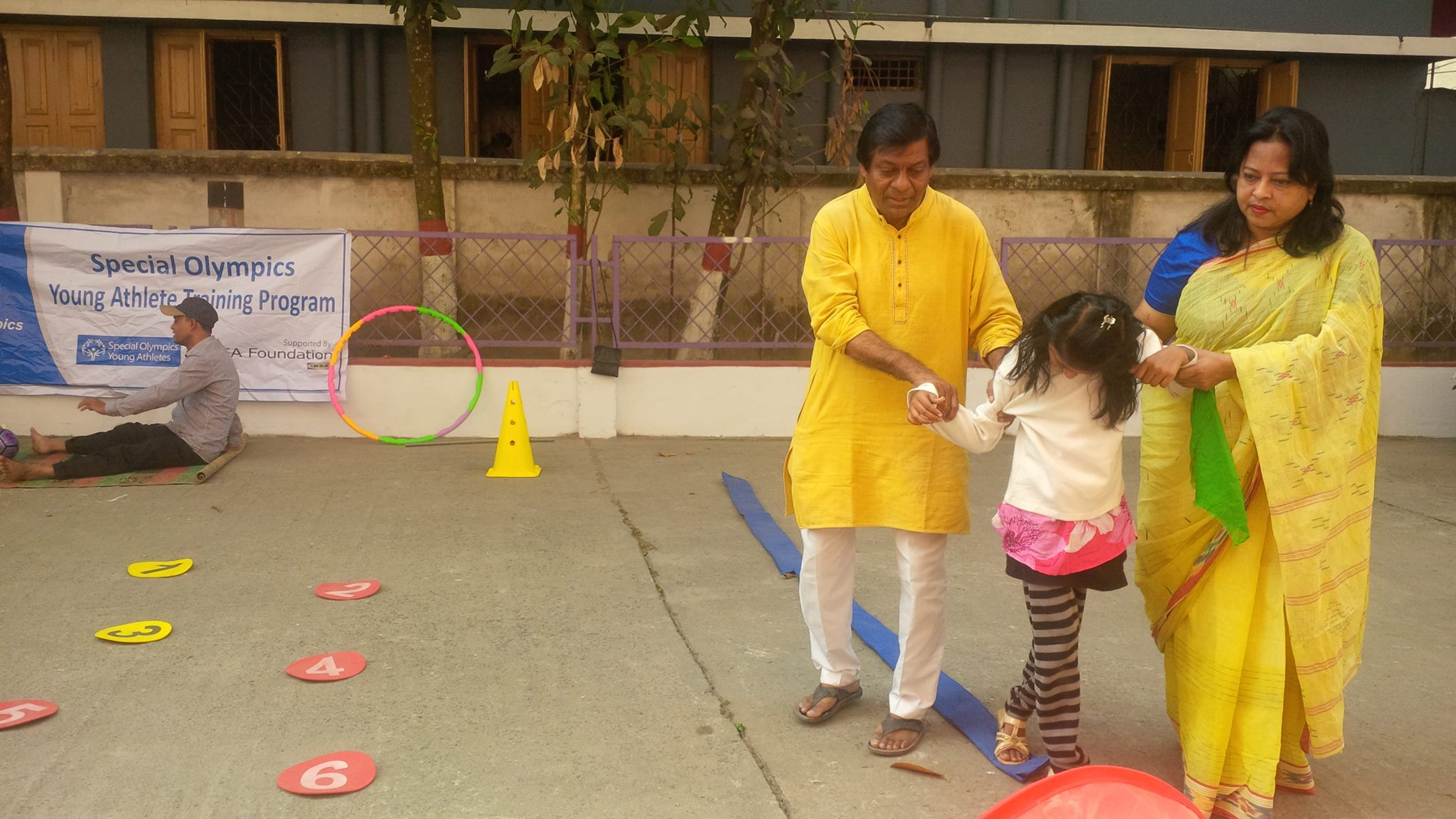 স্কুল মডেল